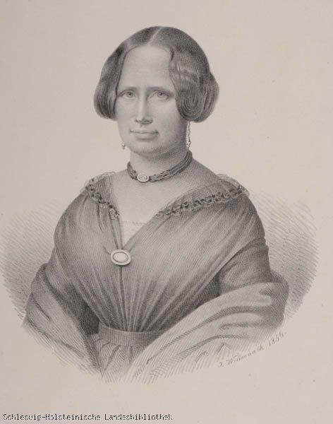 Lithographie von Louise Dahlmann geb. von Horn (* 28. April 1800 in Ottensen; † 9. Februar 1856 in Bonn, Seit dem 3. April 1829 Frau von Professor Friedrich Christoph Dahlmann (1785-1860) Eltern: Friedrich Bogislav von Horn, dänischer Oberstleutnant, und Sophie Georgine Luise geb. von Warnstedt.